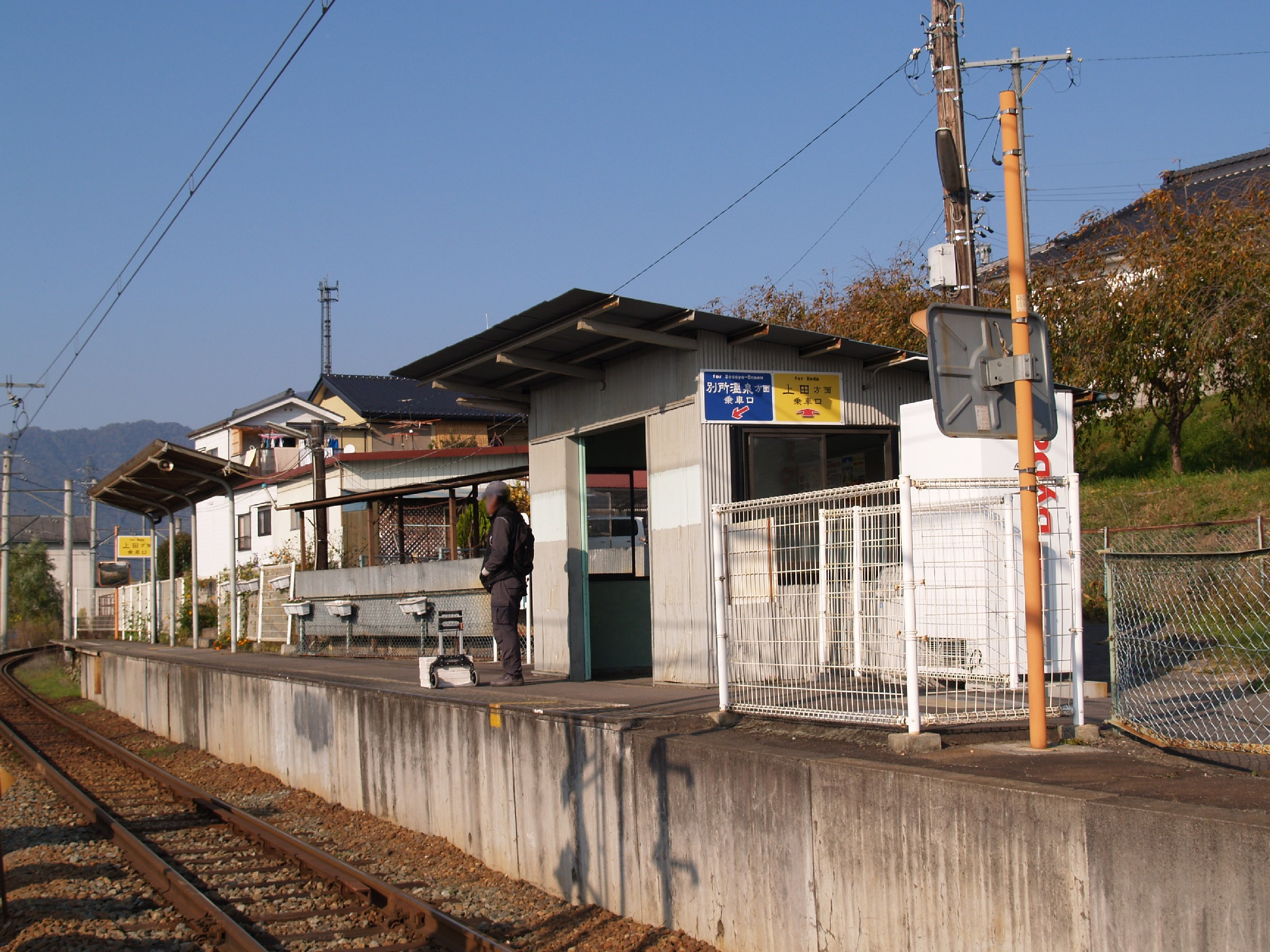 寺下駅